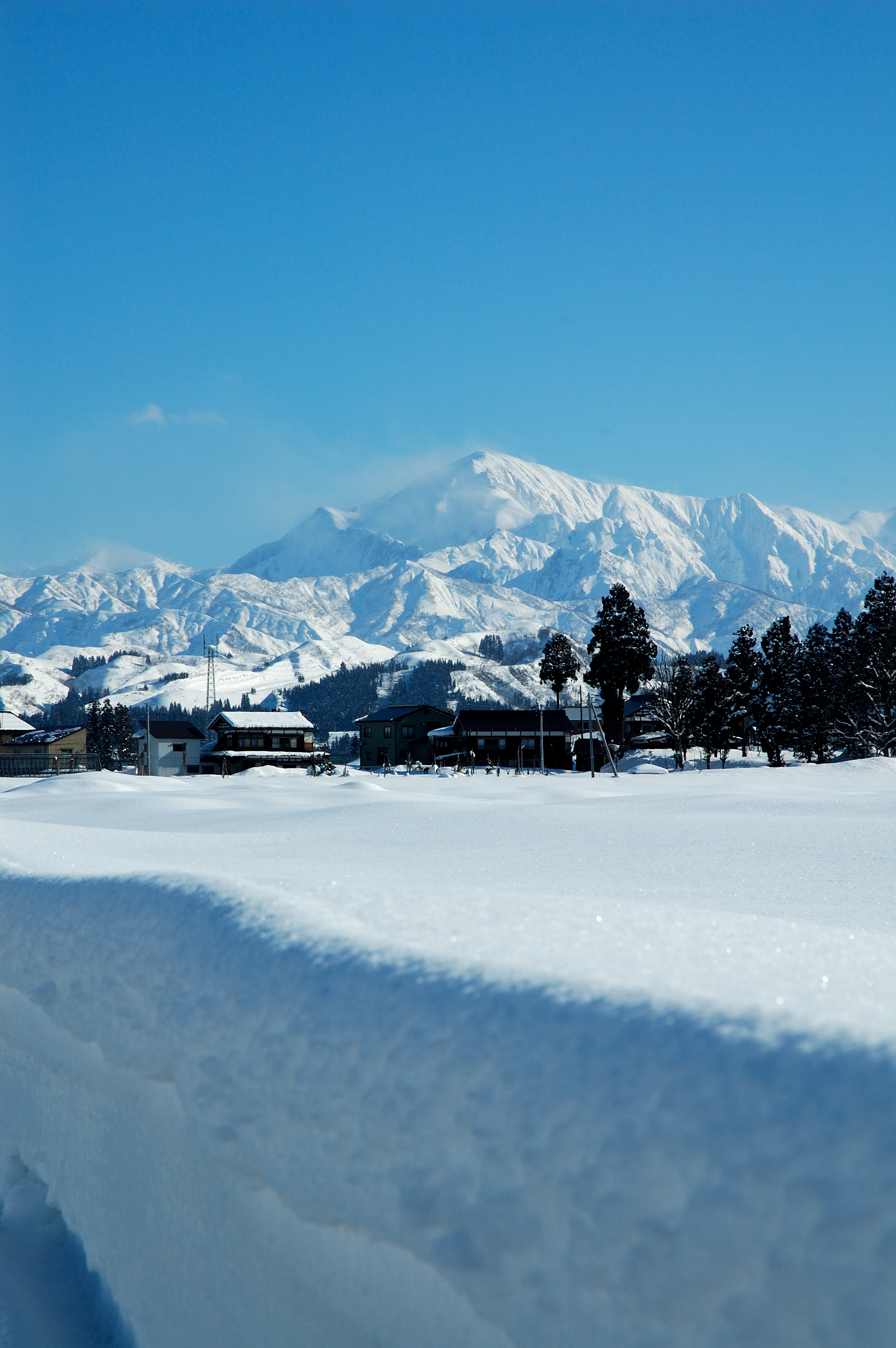 Snow mauntains in Niigata, Japan